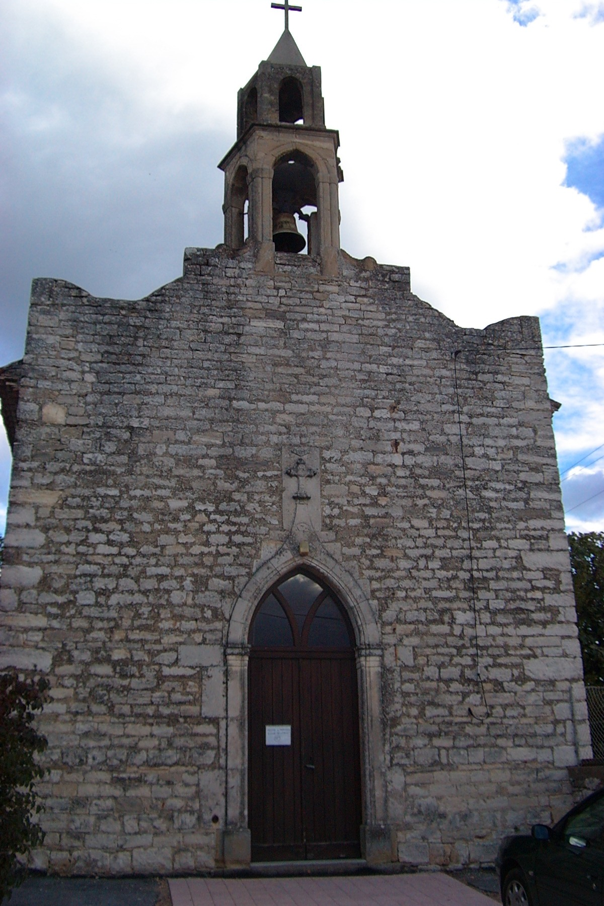 L'église St Sauveur, du village de Monteils (Gard), en haut de la colline